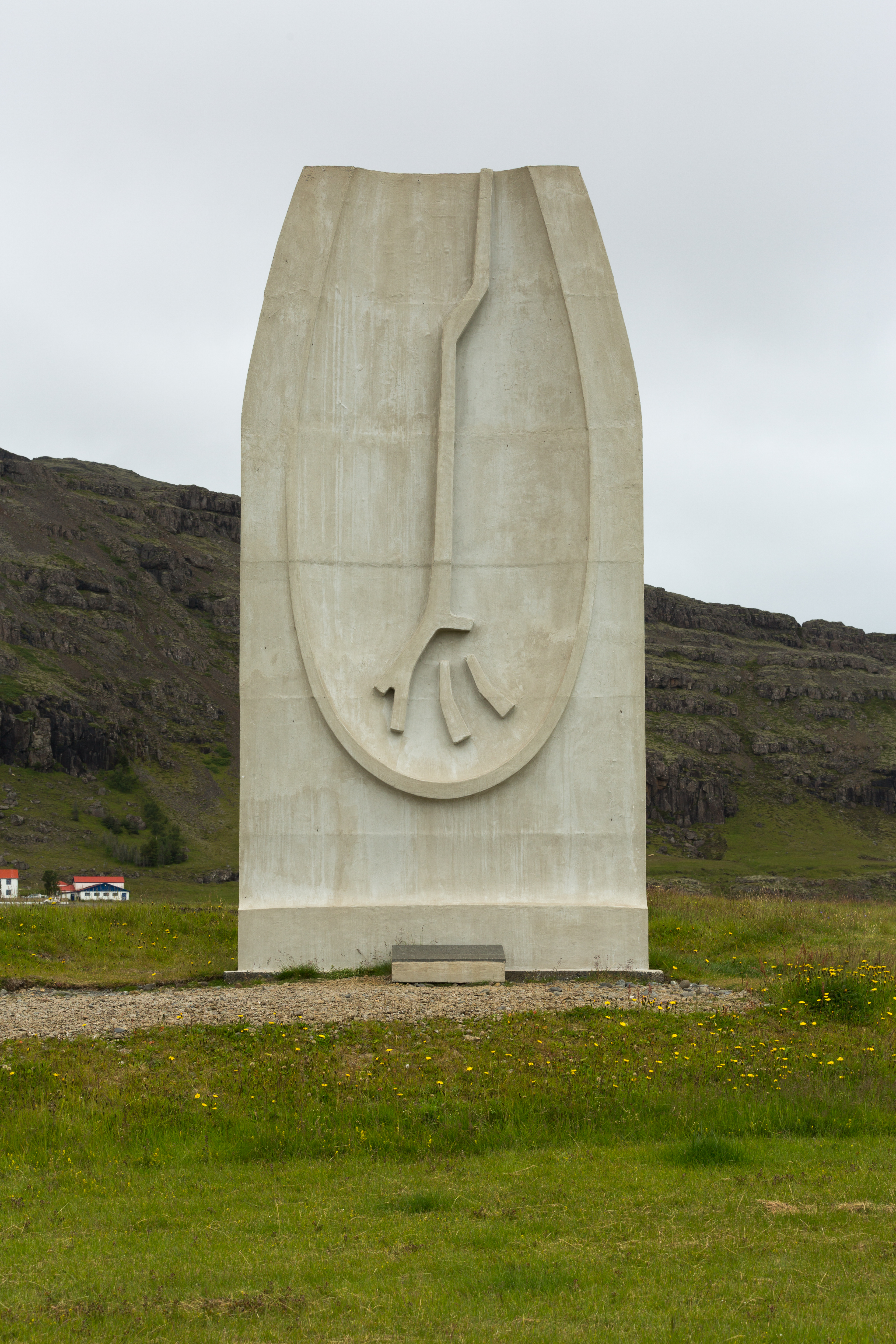 mindesten for Jon Erichsen